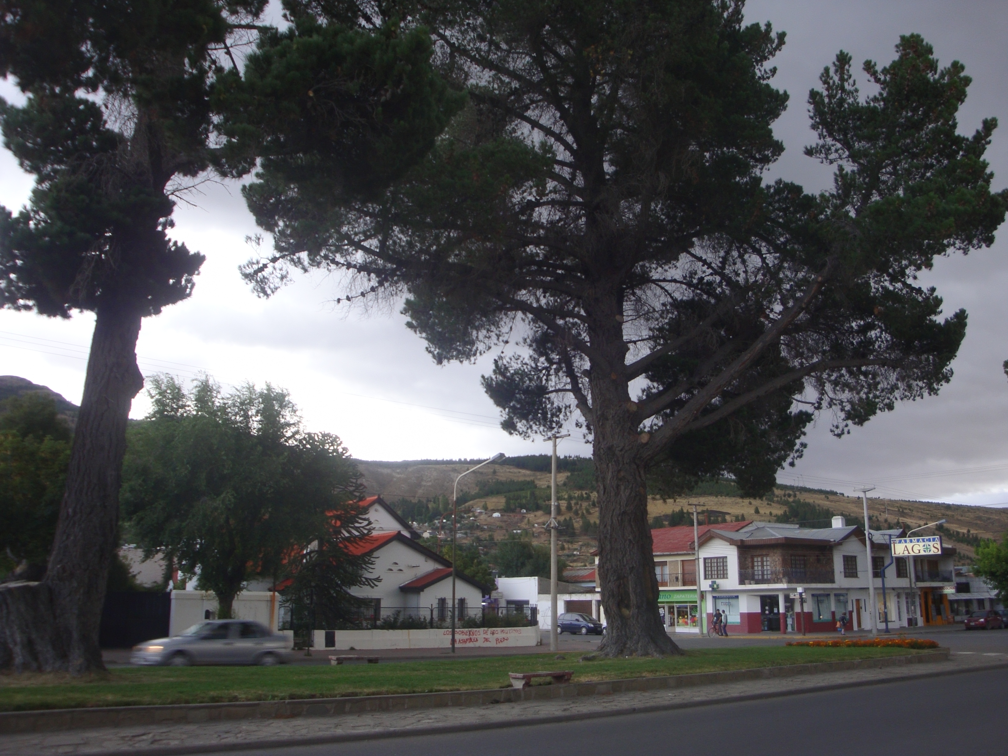 Avenida Alvear, Esquel, Provincia del Chubut, Argentina.